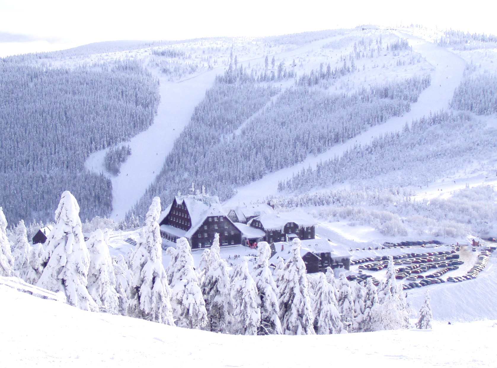 Červenohorské sedlo v Hrubém Jeseníku z vrcholu sjezdovky na jižním svahu.